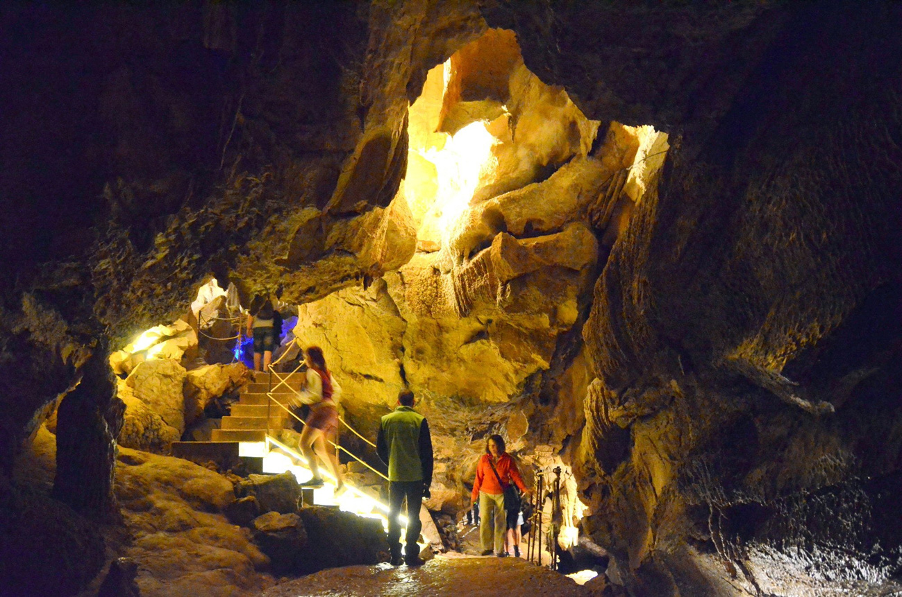 Ikaburuko leizearen eguna, 2016-07-16. Urdazubi, Nafarroa Garaia.